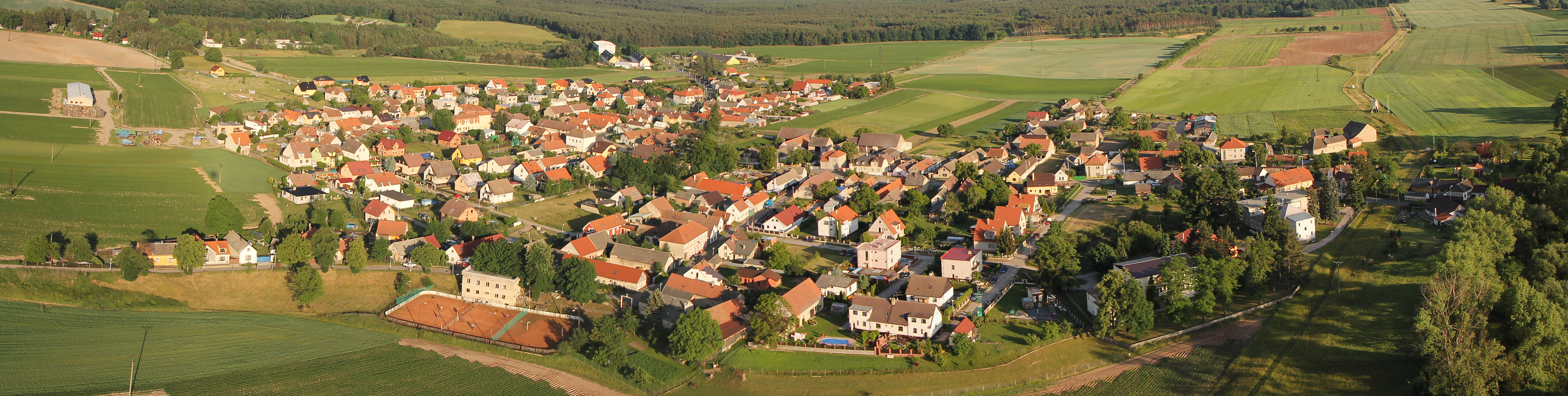 letecký snímek obce Sojovice